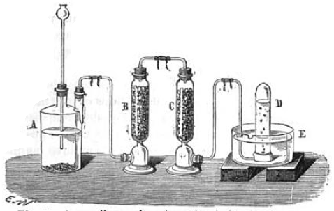 Appareil pour la préparation de l'hydrogène pur: A-Flacon ou se dégage l'hydrogène B-Éprouvette remplie de morceaux de pierre ponce imbibée de potasse C-Éprouvette remplie de morceaux de pierre ponce imbibée d'une solution de sublimé corrosif (bichlorure de mercure) D-Éprouvette ou vient se rendre le gaz purifié